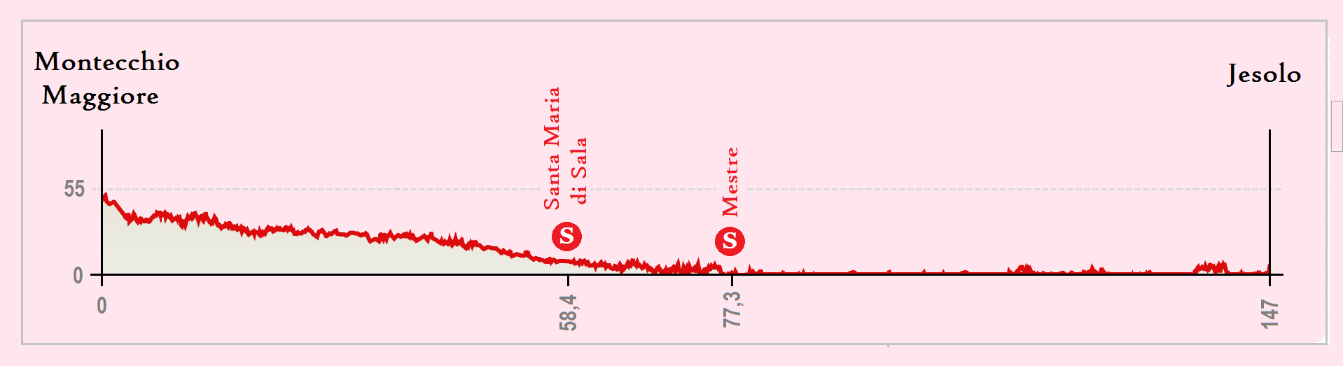 Perfil de la 13.ª etapa del Giro de Italia 2015